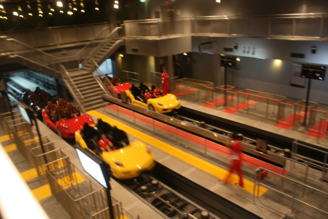 Stationsbereich von Fiorano GT Challenge